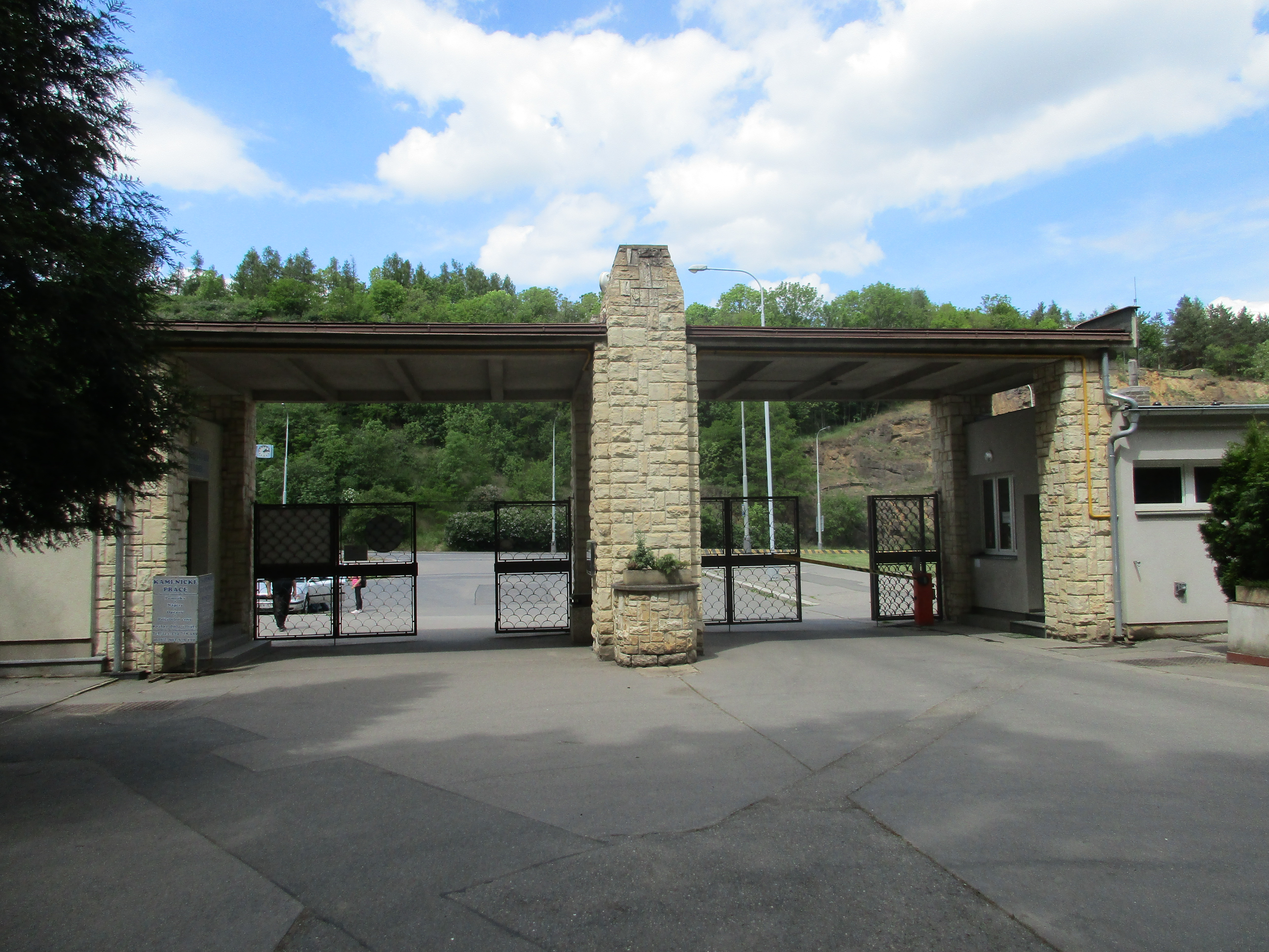 Hřbitov Motol - hlavní brána.